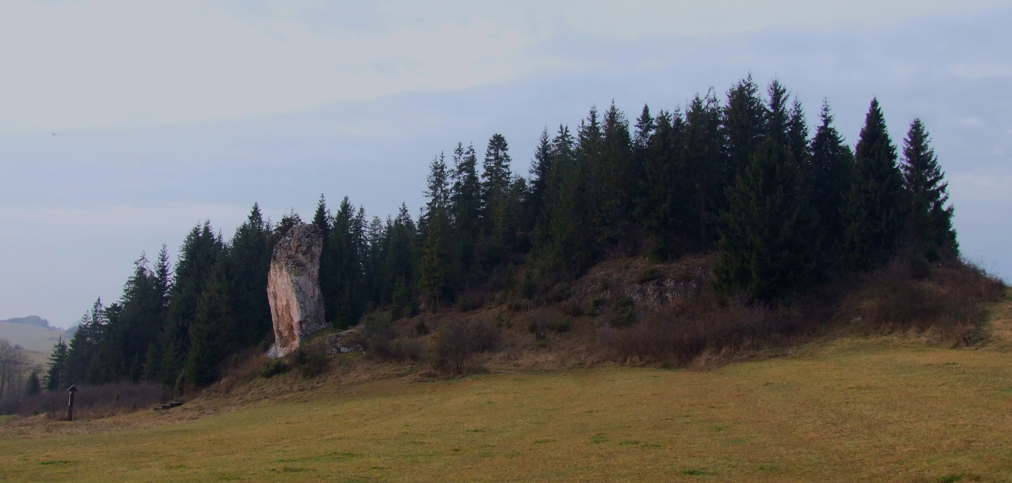 Dursztyńskie Skałki (Gęśla)